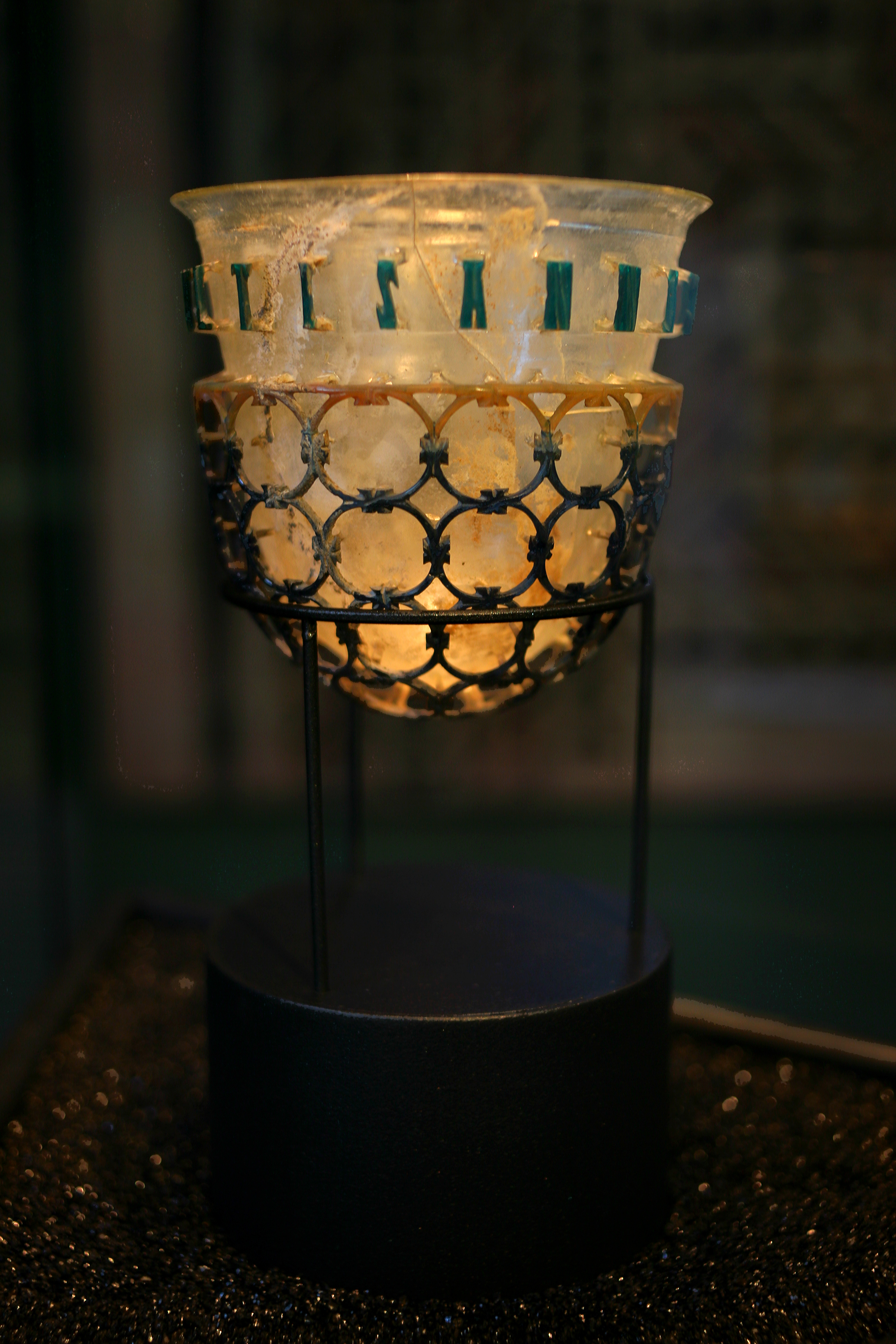 La cosiddetta diatreta Trivulzio esposta al Museo Archeologico di Milano